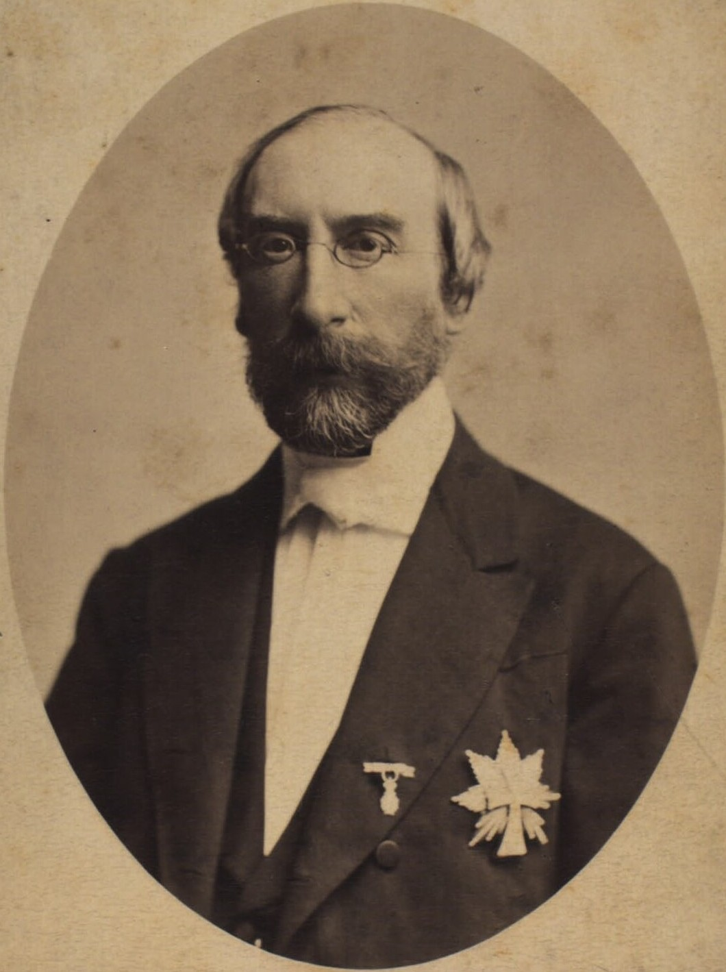 Johannes Nellemann